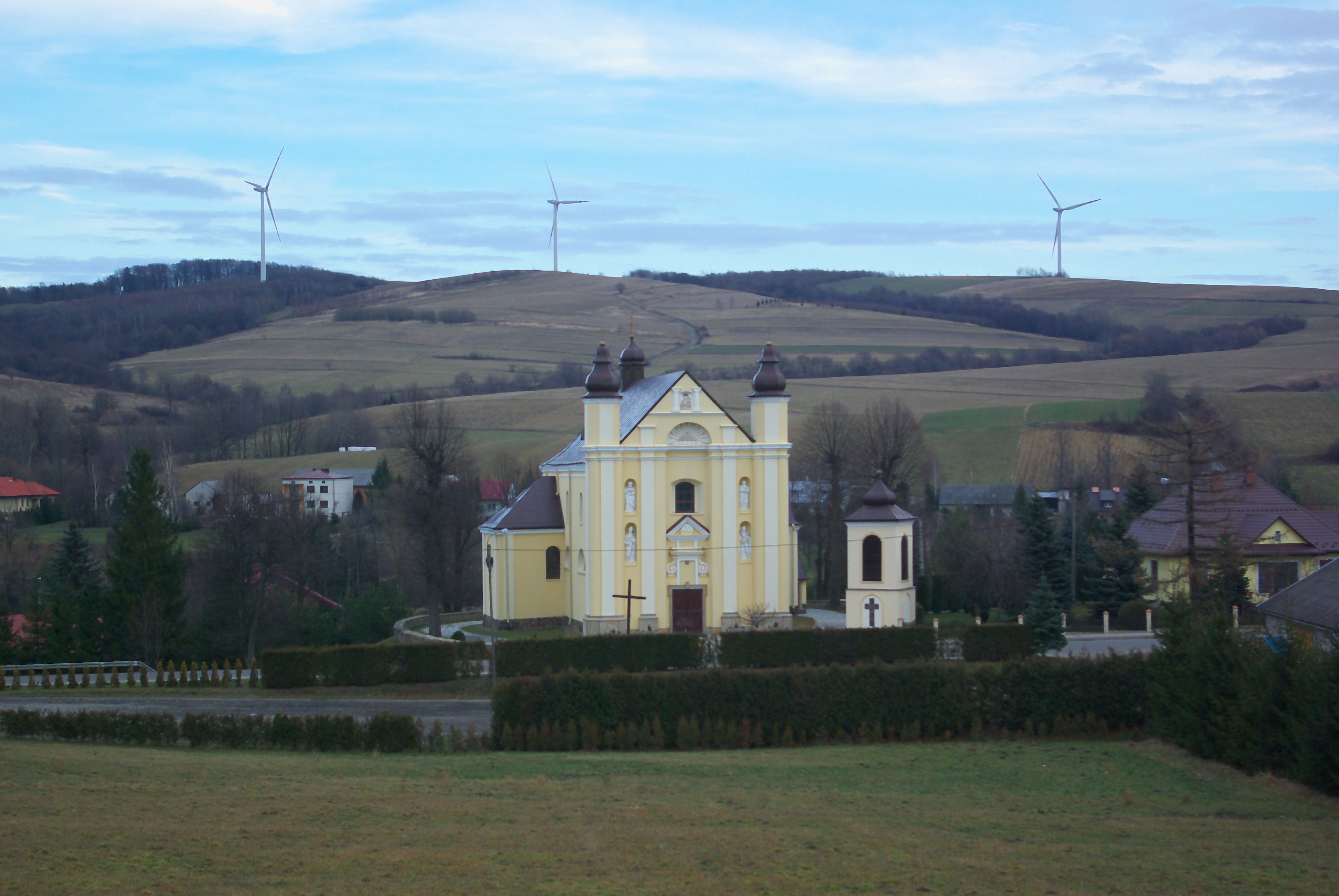 Kościół św. Mikołaja w Nowotańcu